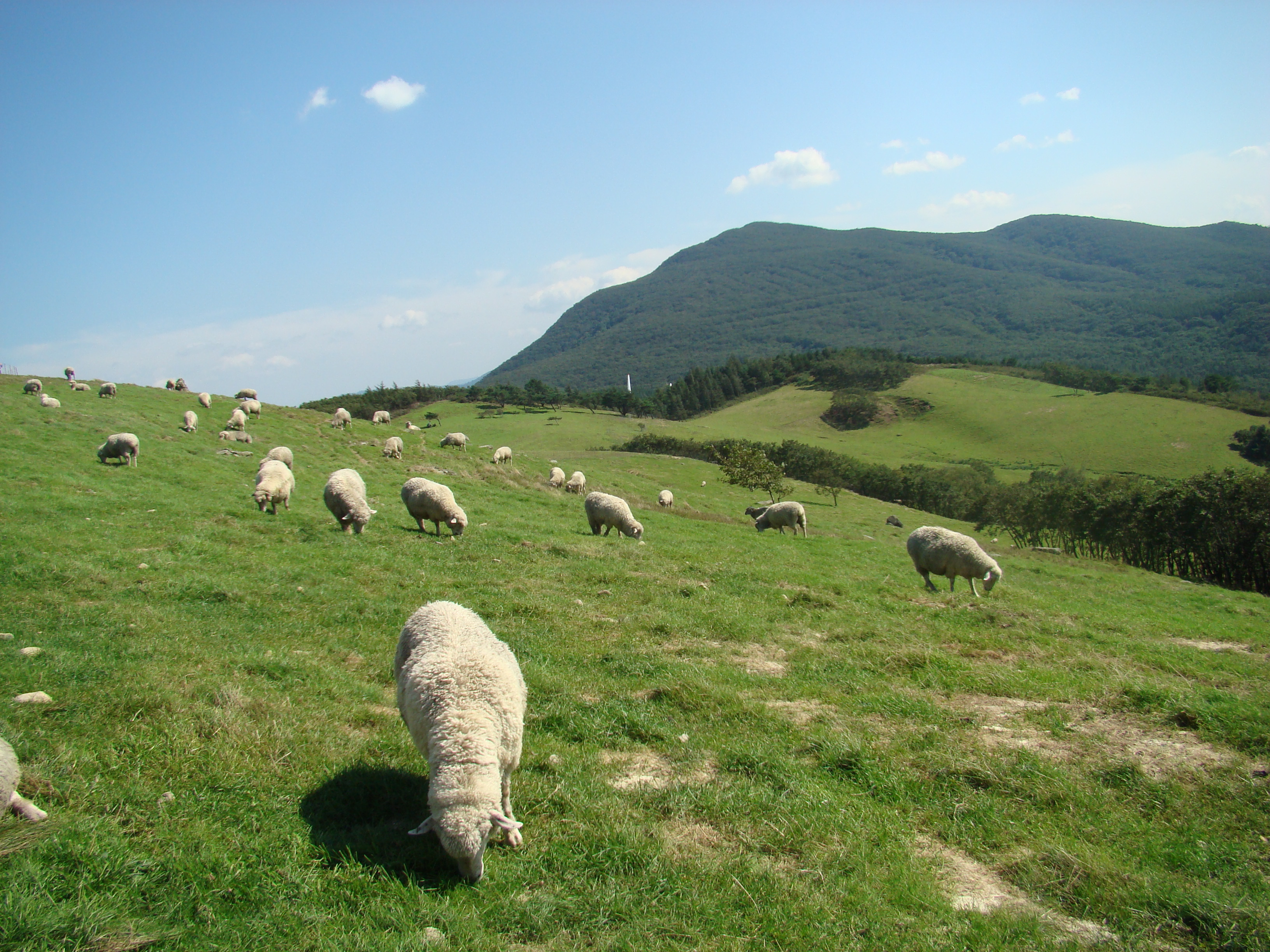 풀뜯는 양들